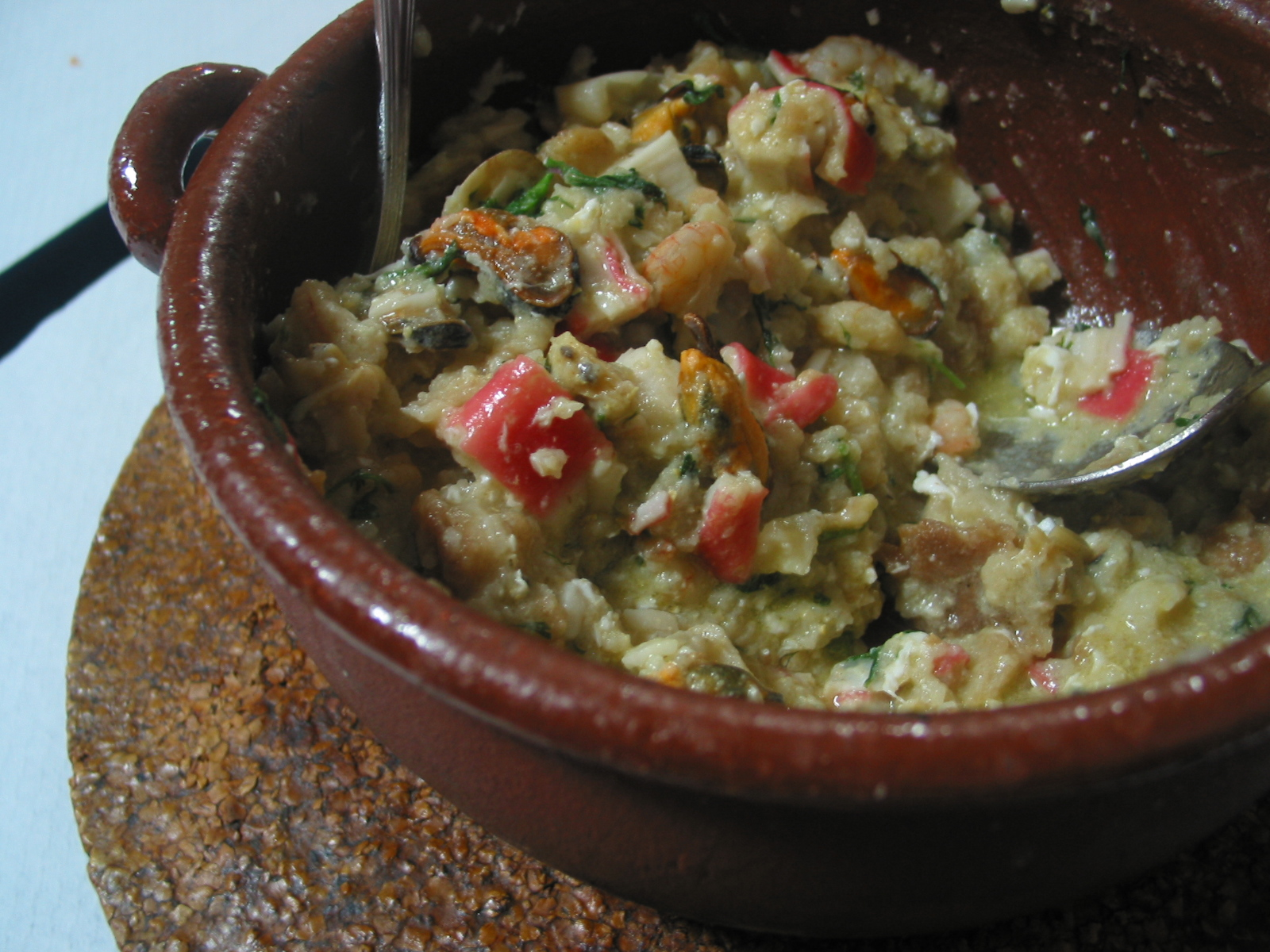 Tinha a máquina a postos para fotografar logo que a açorada chegasse, mas a vontade de provar era tanta que só nos lembramos quando iamos a meio. Restaurante: Ria Formosa Açorda de Marisco ?14